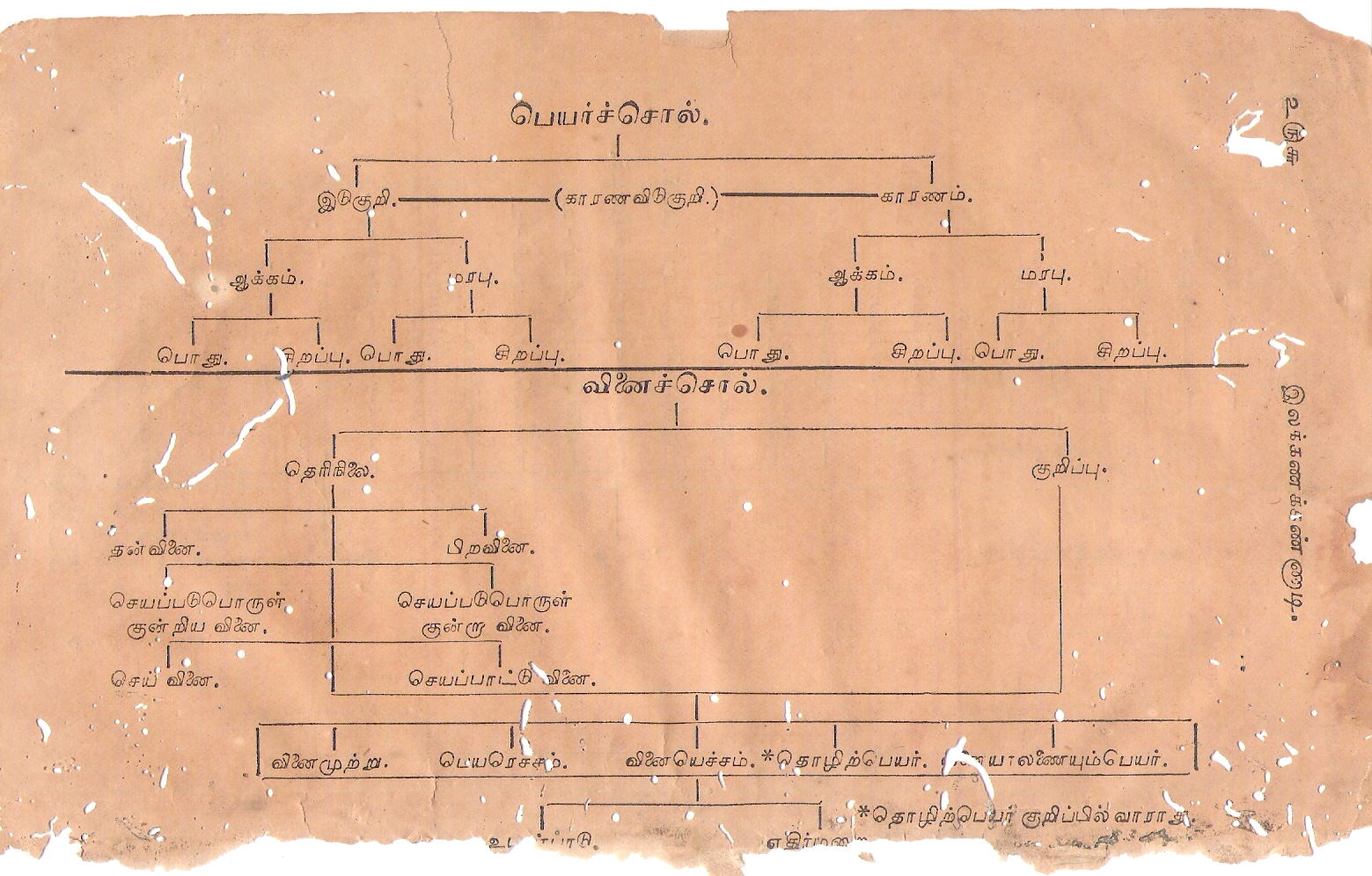 தமிழ்